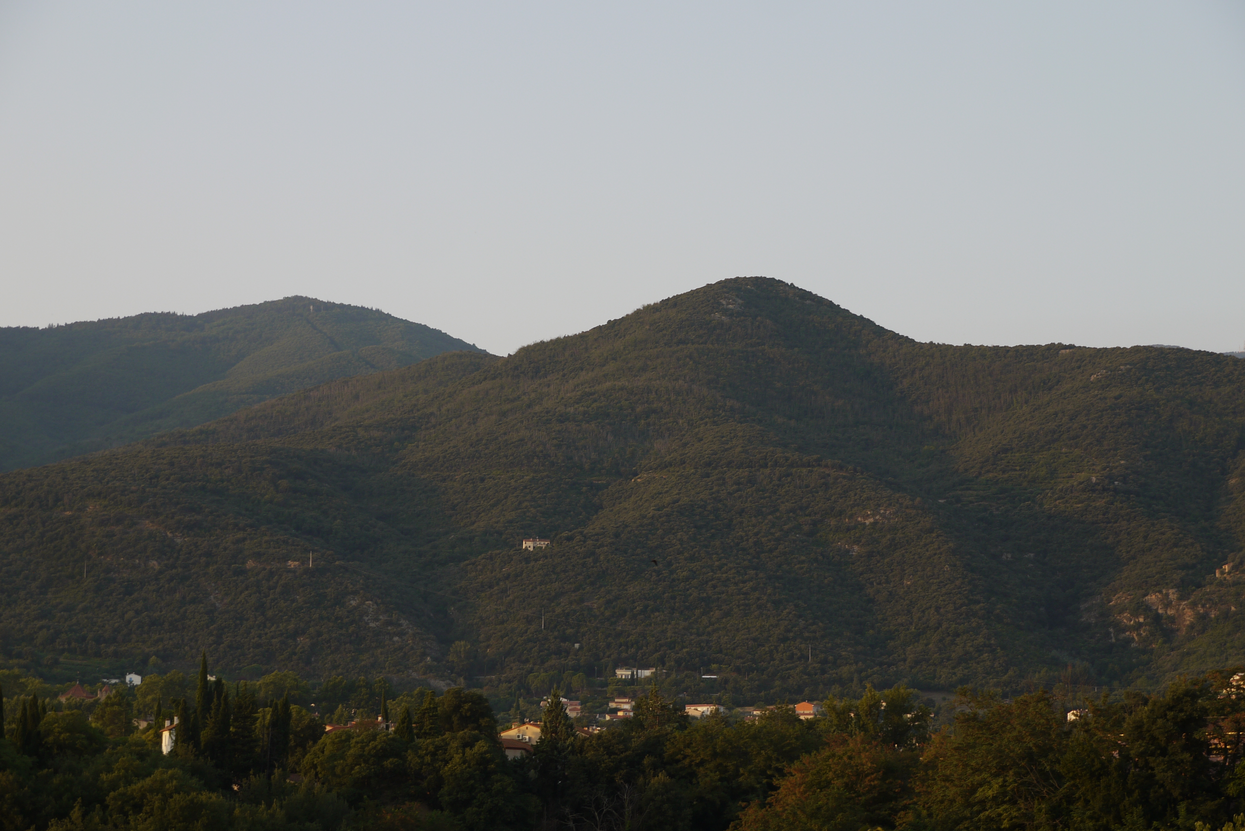 Le pic de Garces à Céret vu depuis le nord